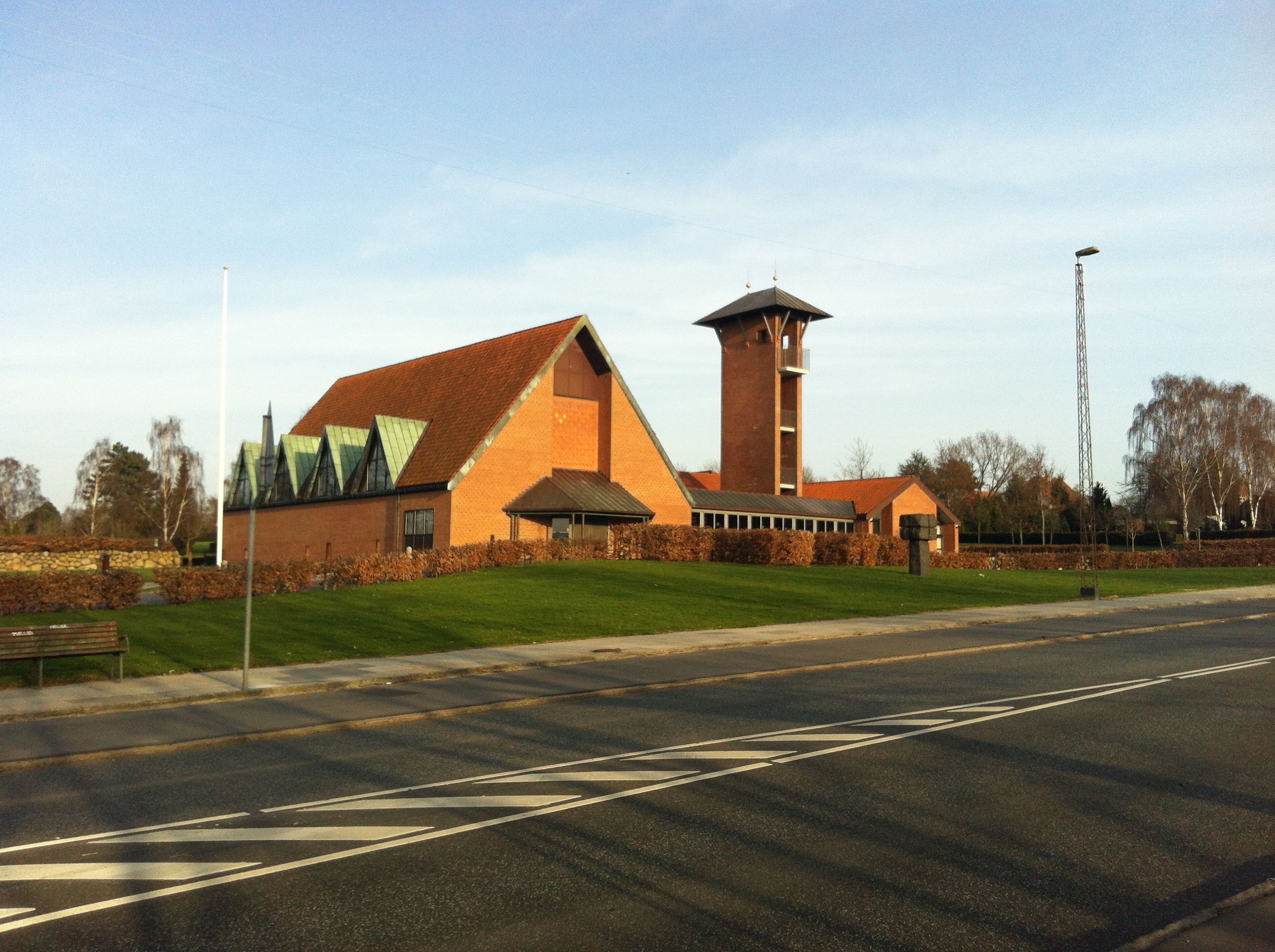 Fredens Kirke, Århus